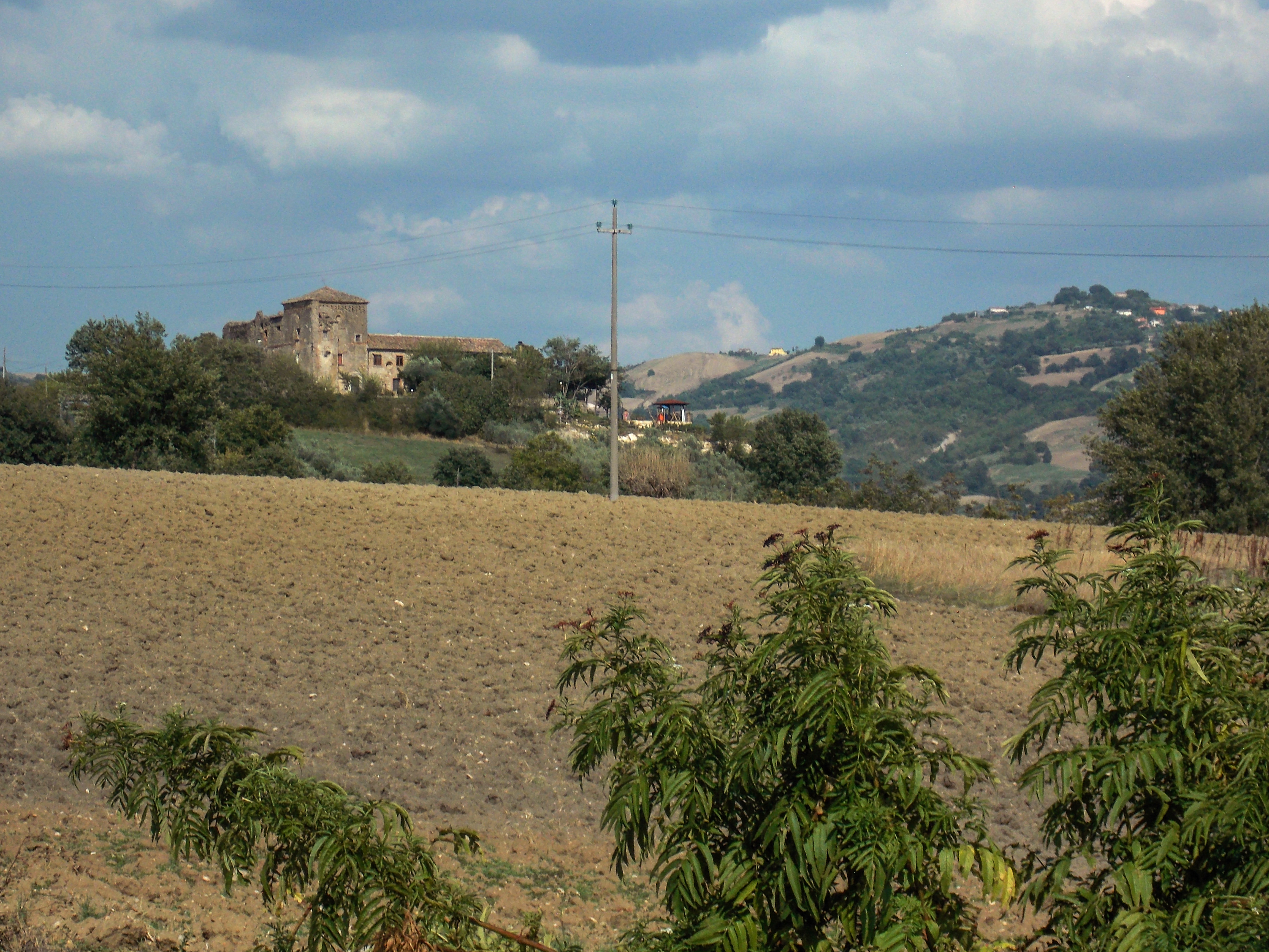 Il Casino del Principe, costruzione voluta da Federico II al Cubante di Calvi (BN)